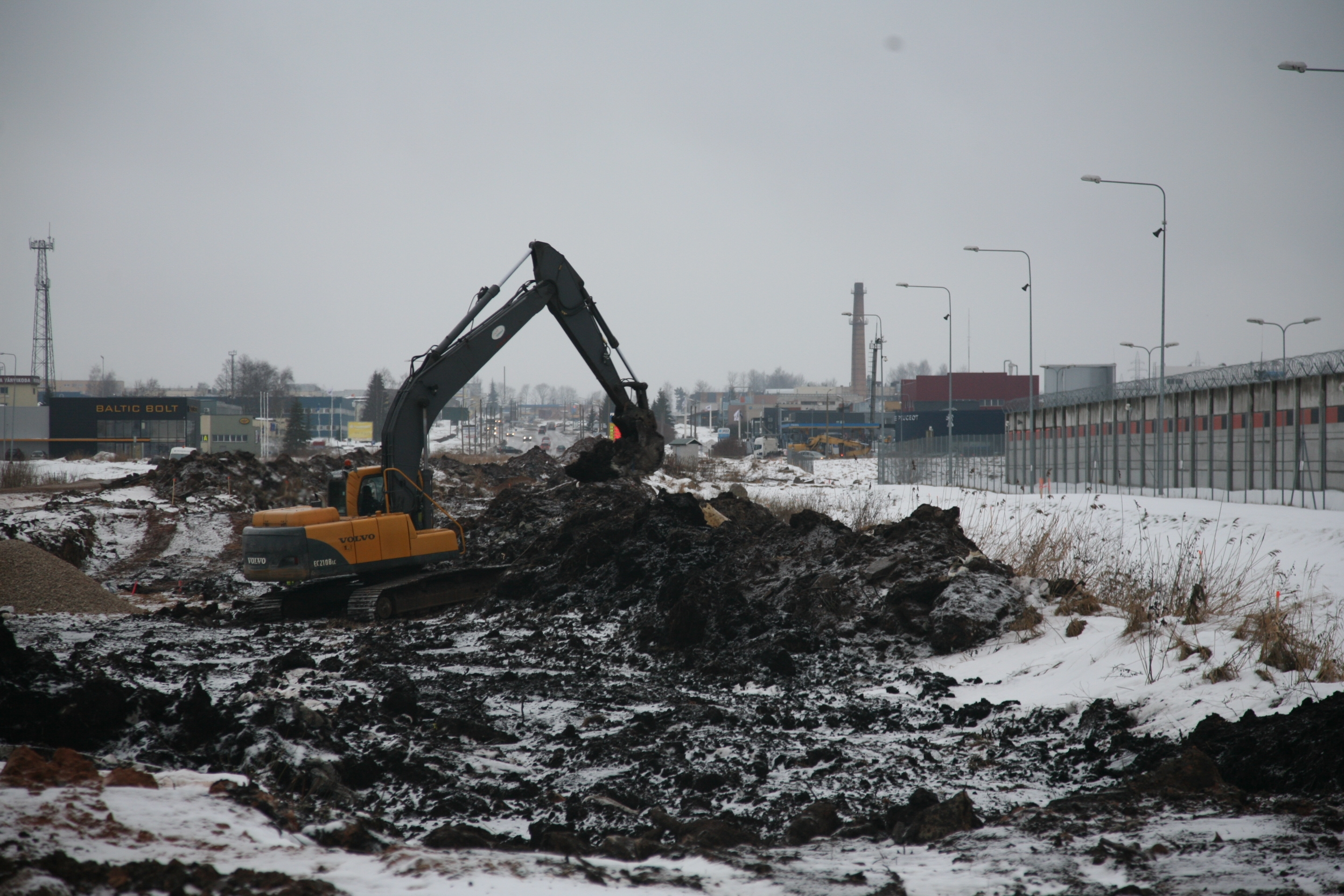 Tartu Idaringtee ehitus, vaade piki Ringtee tänavat, 1. veebruar 2013.